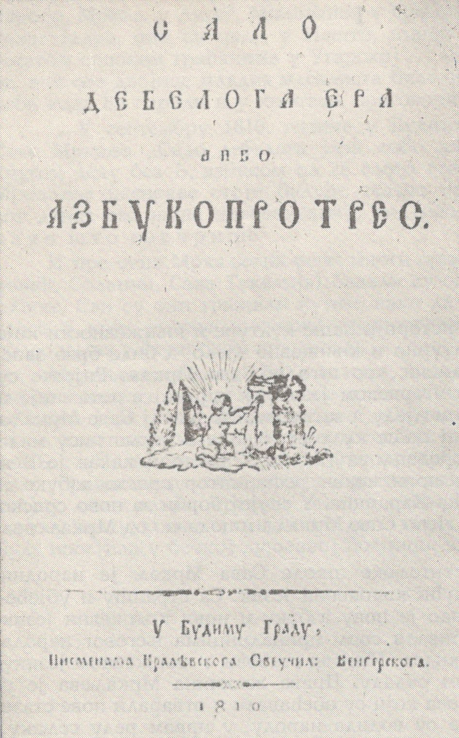 Дело од значаја за српсо писмо у којем се Сава Мркаљ залагао за фонетско писмо базирано на народном језику